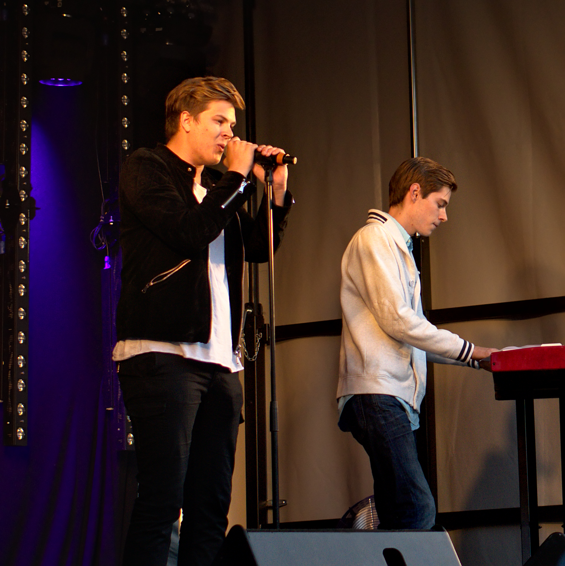 Philip Spångberg vid ett uppträdande på Fristadstorget i Eskilstuna.